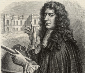 Immagine di Gian Domenico Cassini